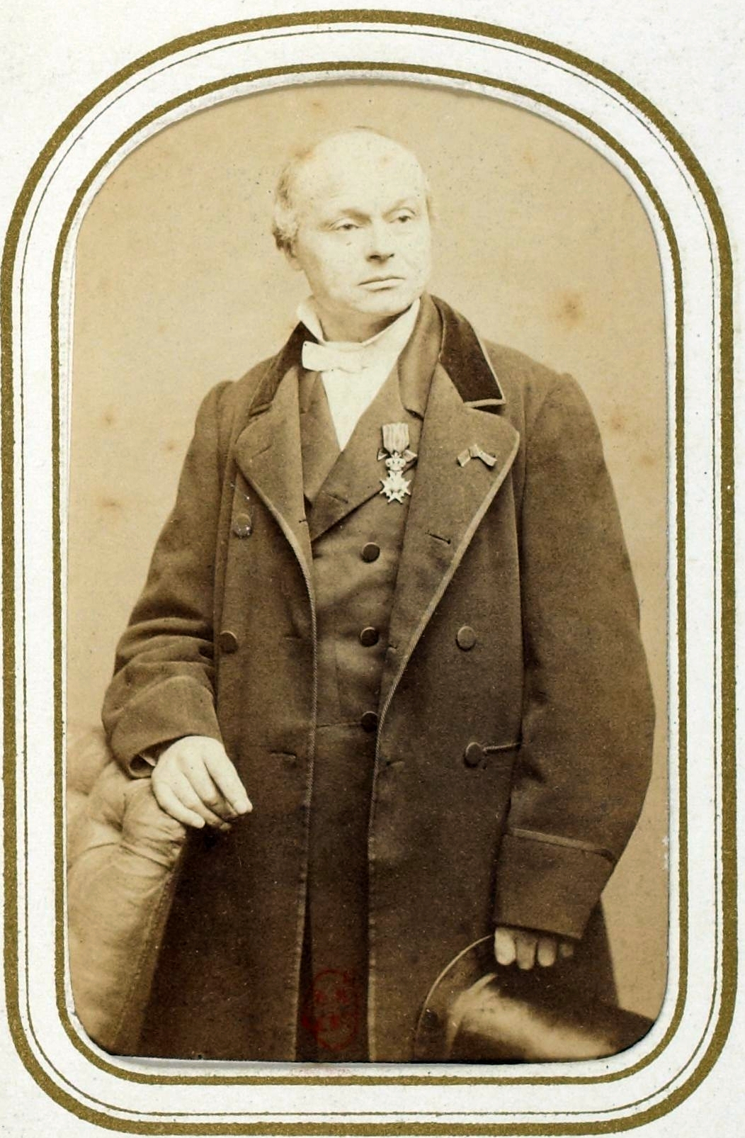 [Recueil. Personnalités des arts et des lettres] : vue 46 - F. 20v. Joseph-Alexandre Auzias-Turenne (Carjat phot.)